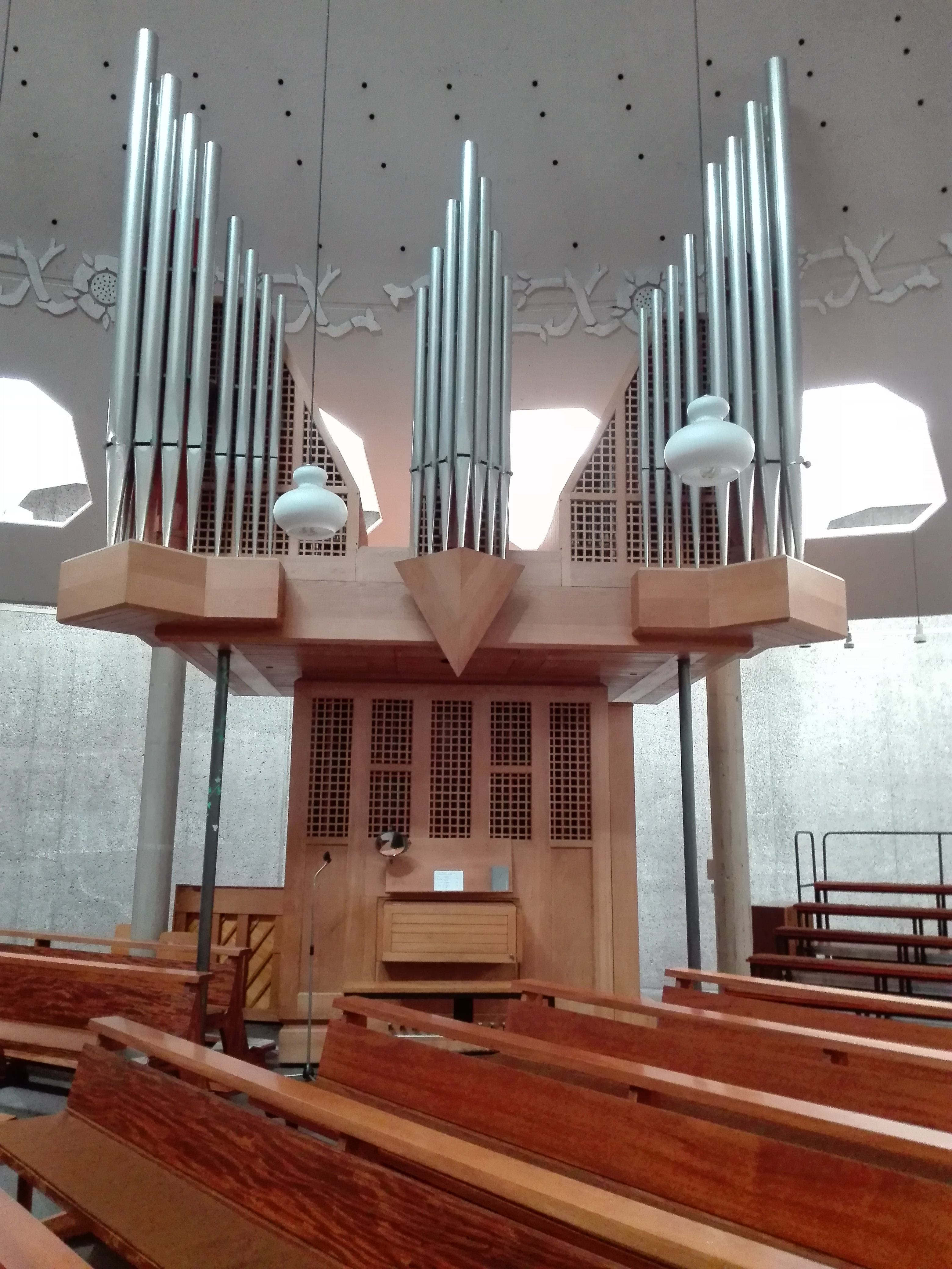 Innenansichten der katholischen Kirche Sankt Remigius in Wuppertal-Sonnborn